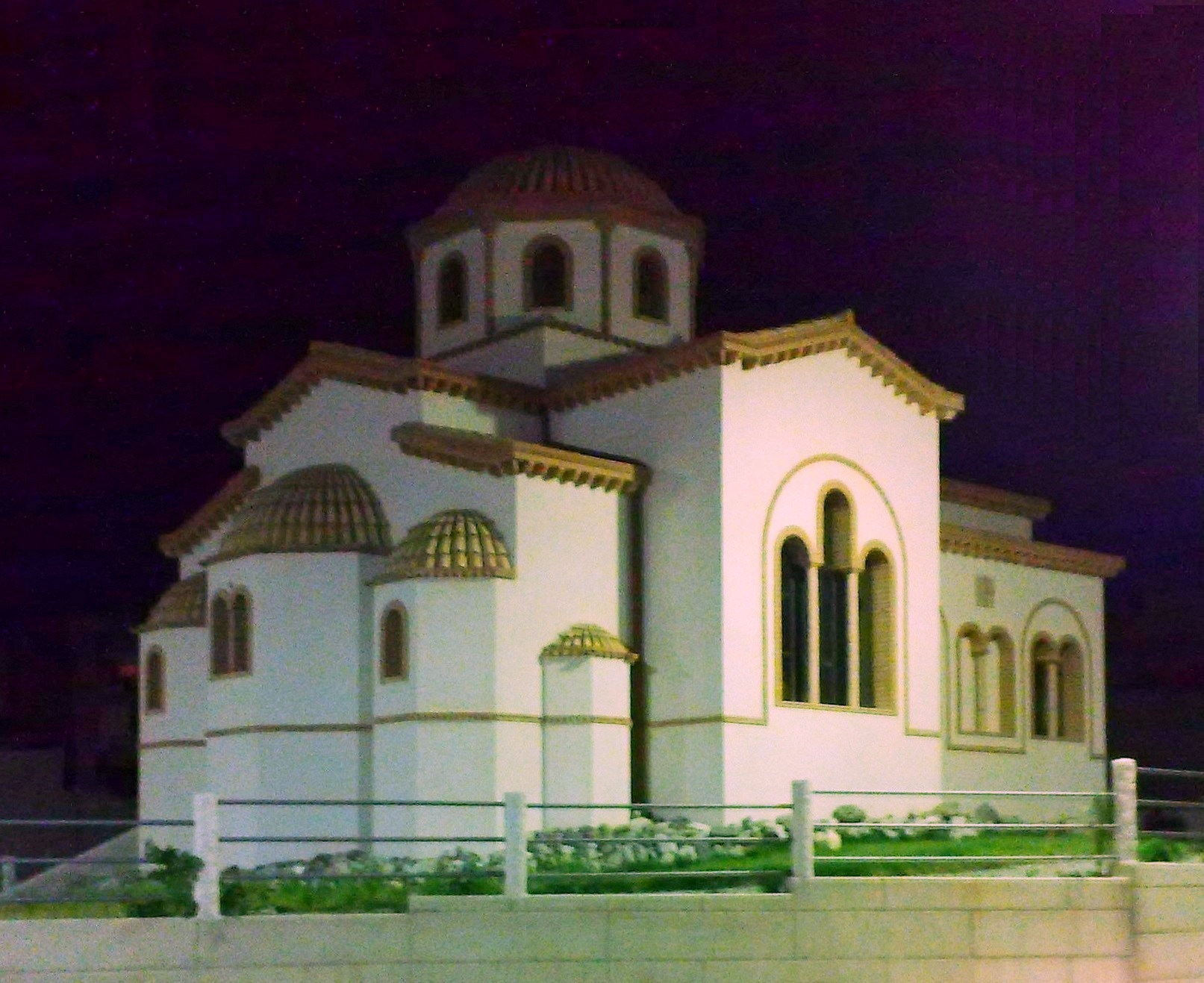 Reggio Calabria, griechisch-orthodoxe Kirche